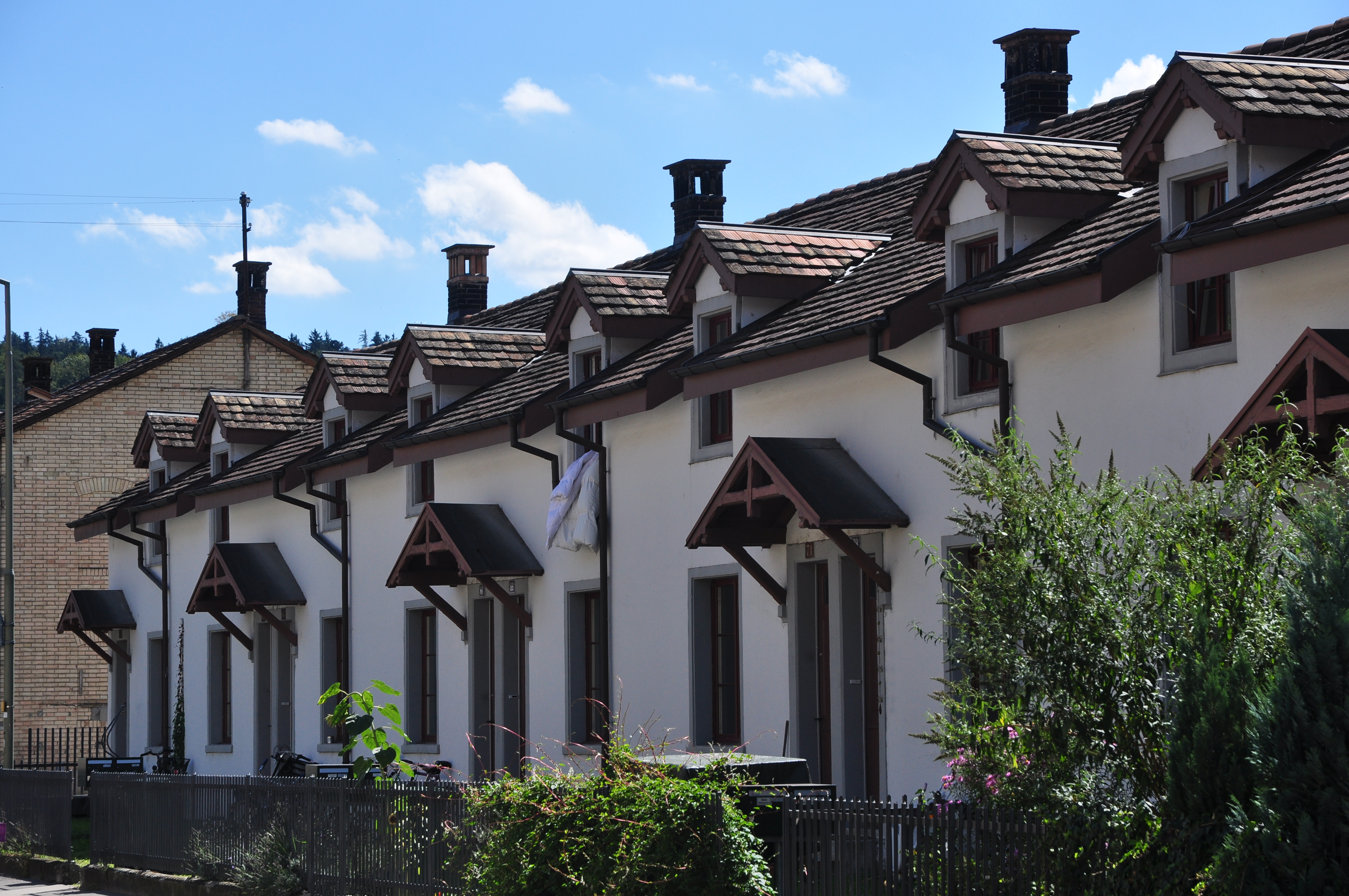 Lokomotivfabrik mit Arbeitersiedlung, Zürcherstrasse 41 in Winterthur (Switzerland)